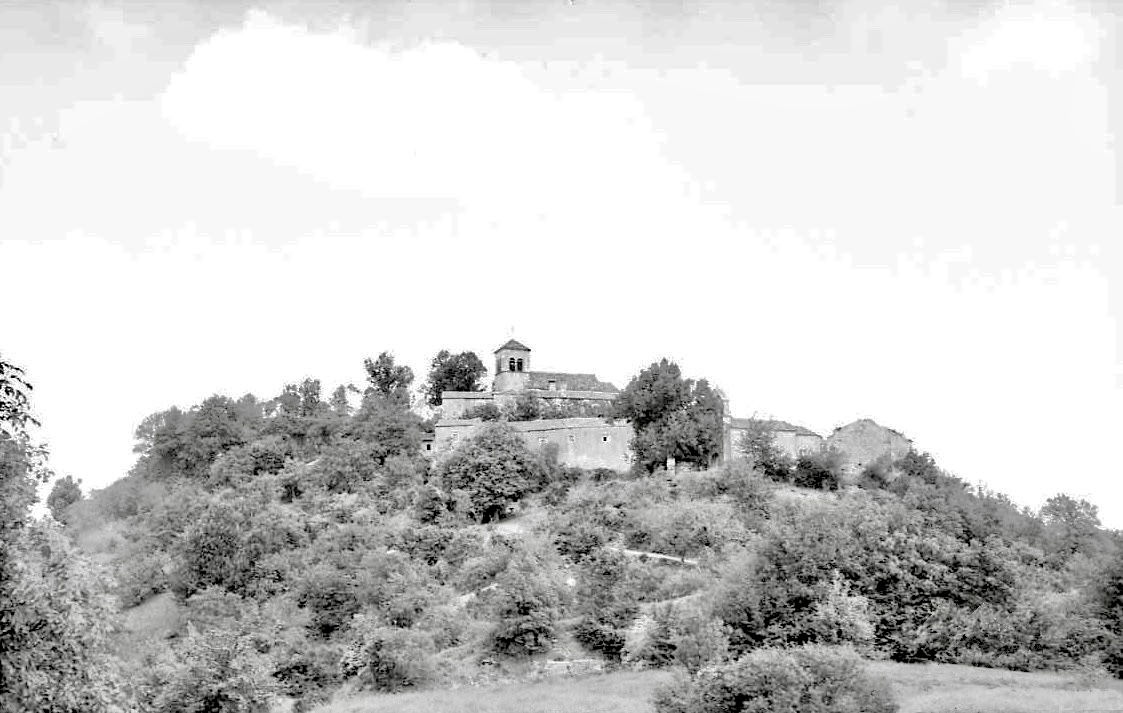 Erzelj - Tabor.